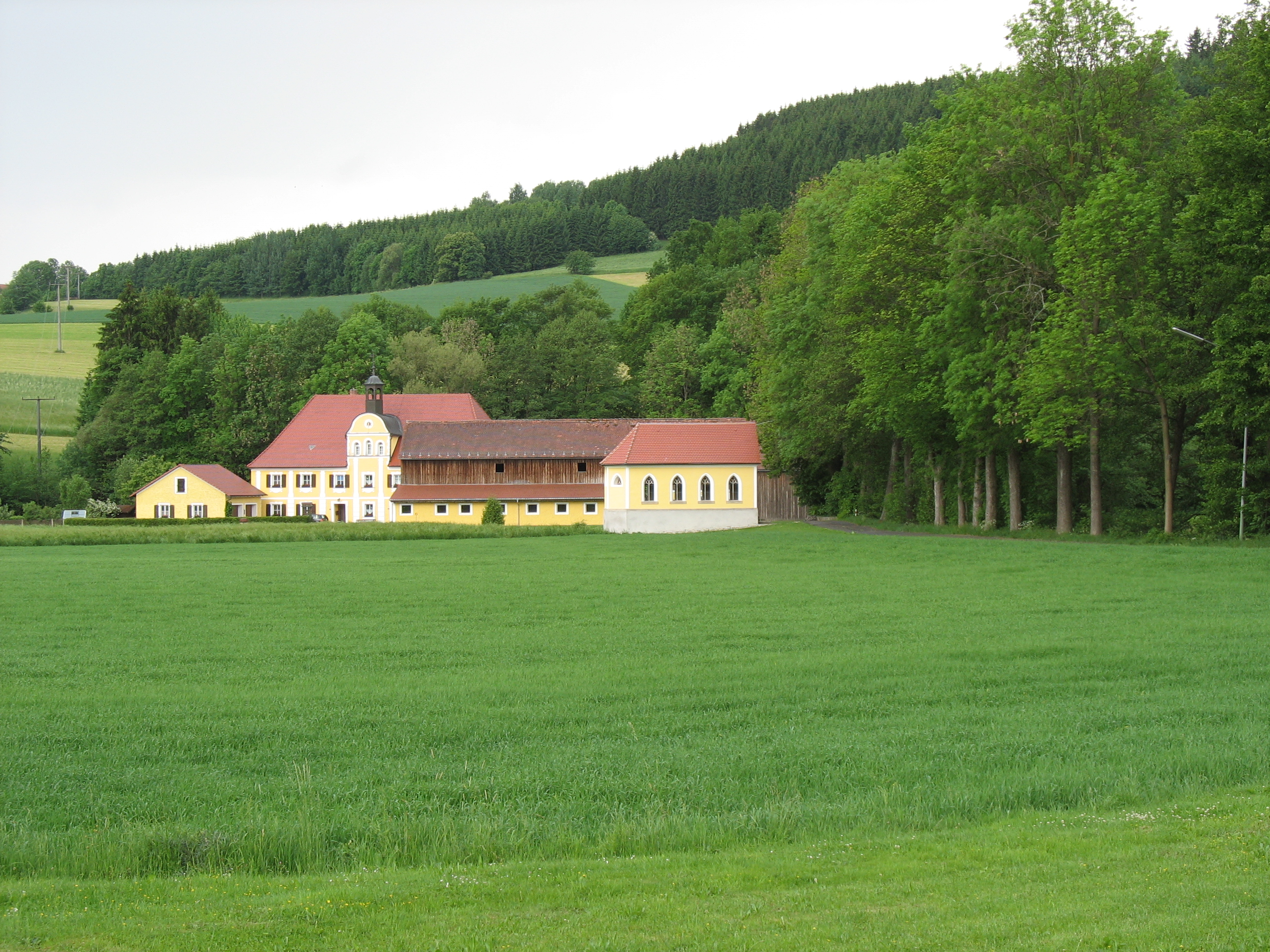 Hammerschloss im Fichtelnaabtal bei GrötschenreuthThis is a photograph of an architectural monument.